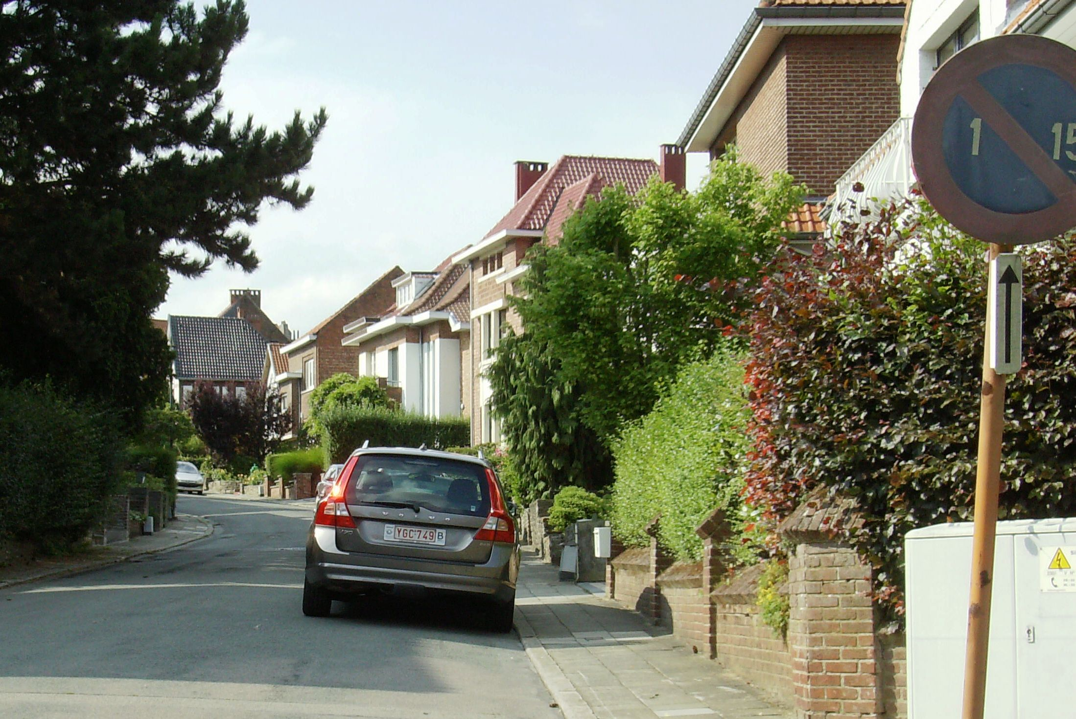 avenue des Passereaux Auderghem Belgium